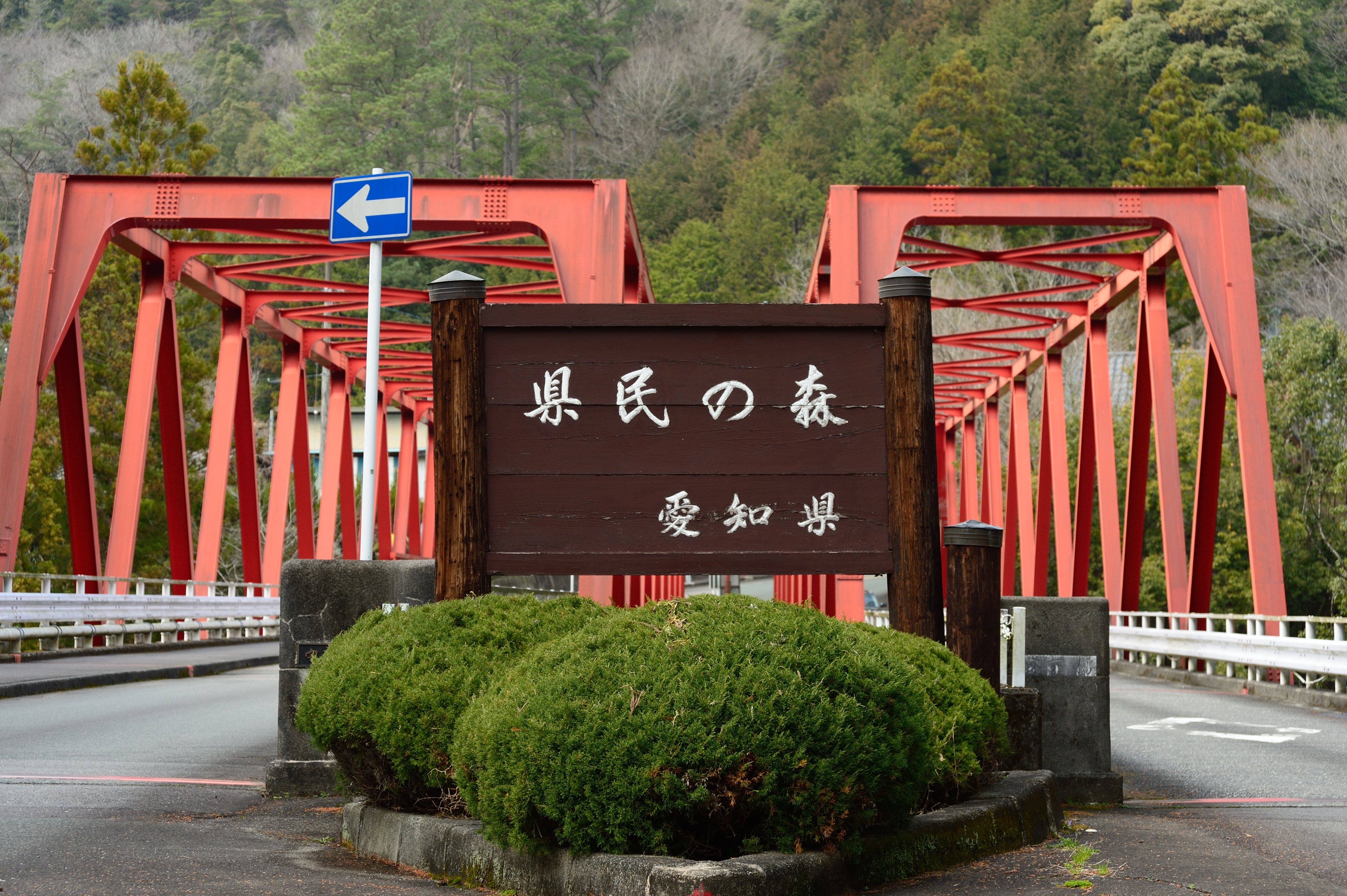 愛知県民の森入口